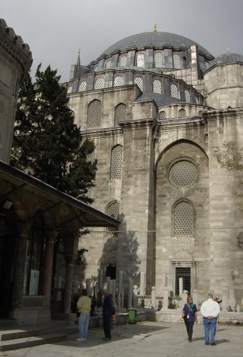 Istanbul : La mosquée de Soliman le magnifique. À gauche : l'entrée du tombeau de Soliman.